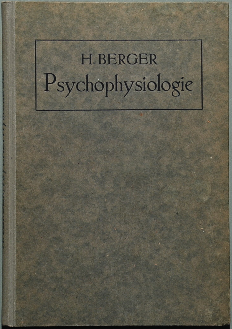 Berger, H.: Psychophysiologie in 12 Vorlesungen. Jena: G. Fischer 1921, 110 S.; Erstausgabe; Orig.-Pappband gr. 8°